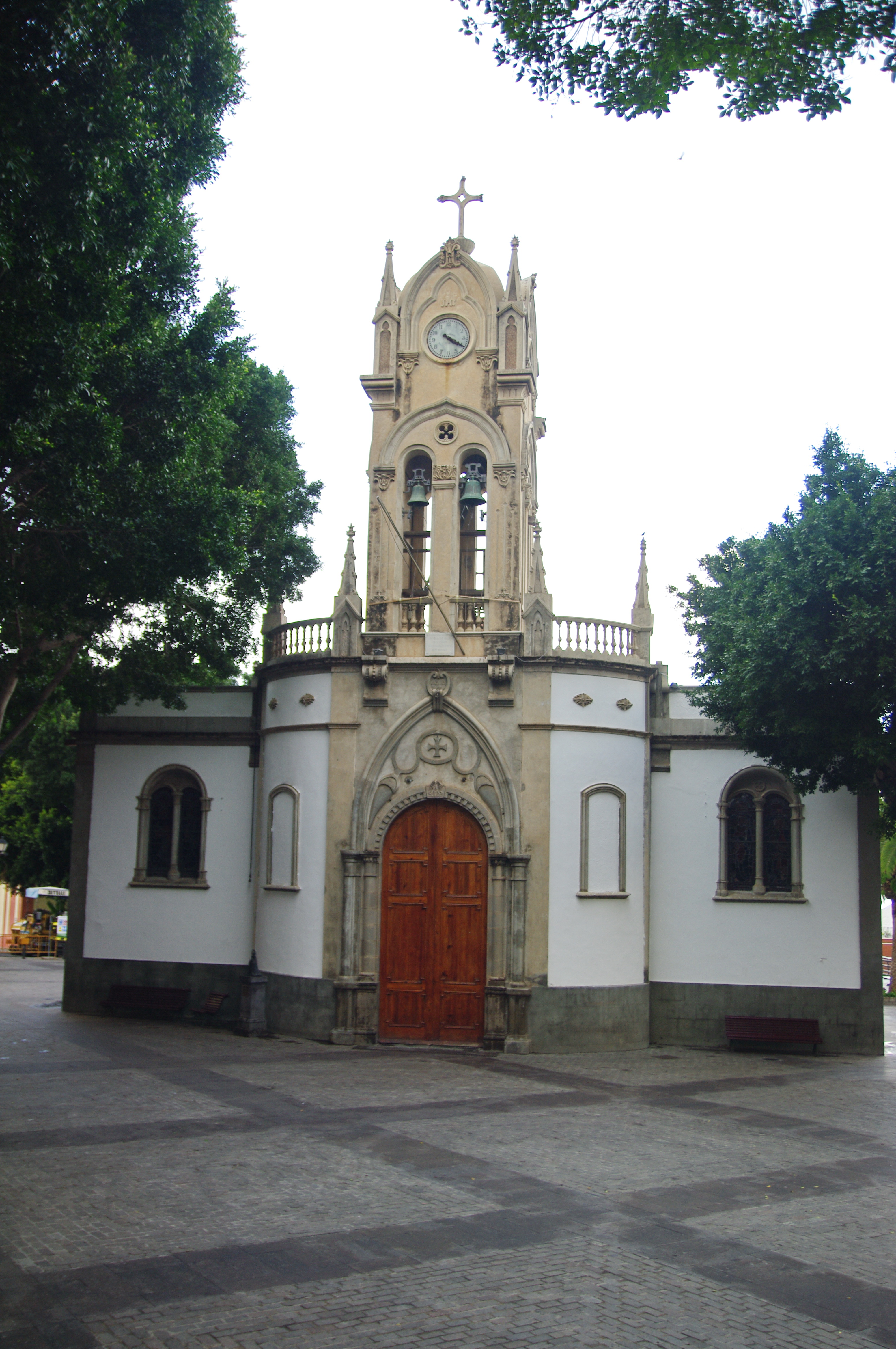 Iglesia de la Virgen de la Luz, Guia de Isora